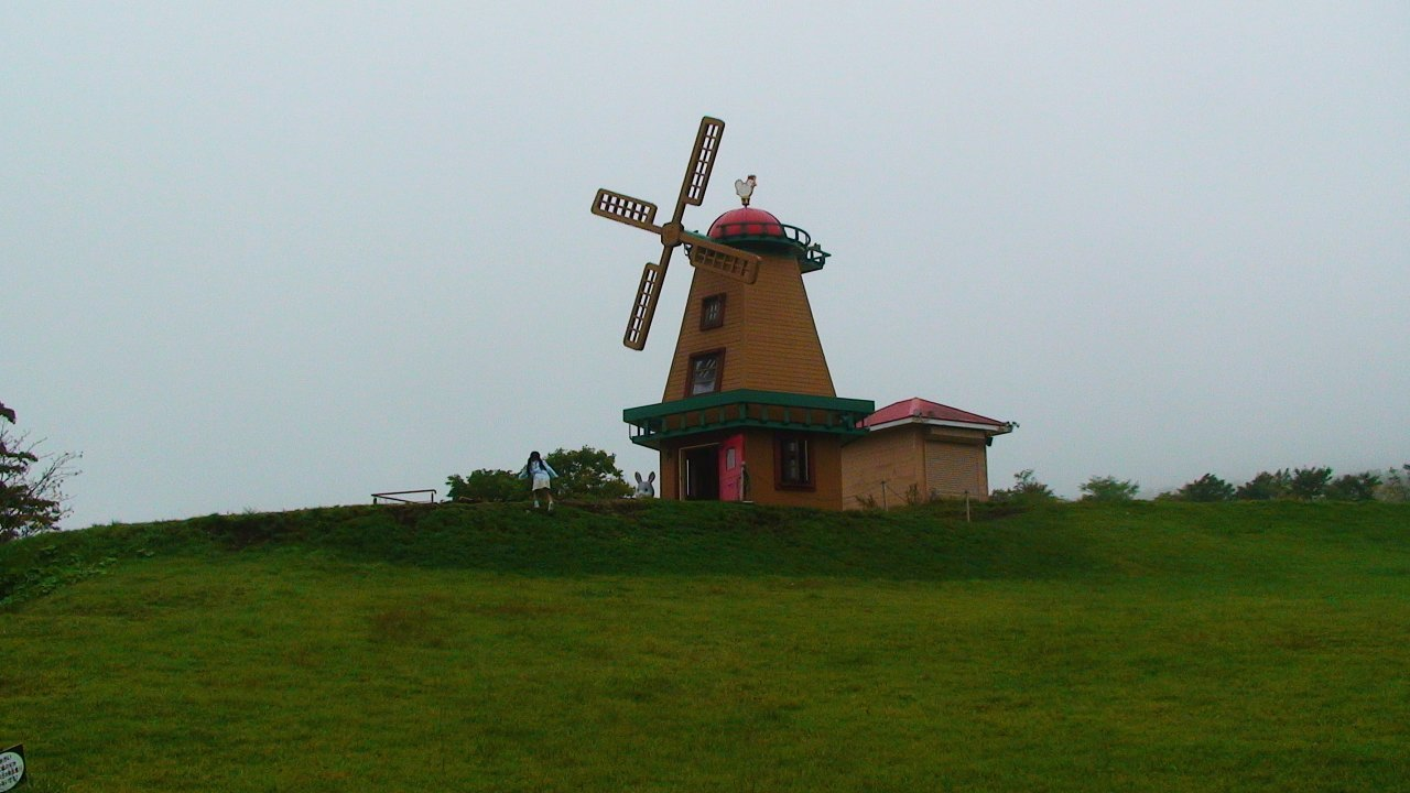 ぐりんぱの風景。静岡県裾野市。